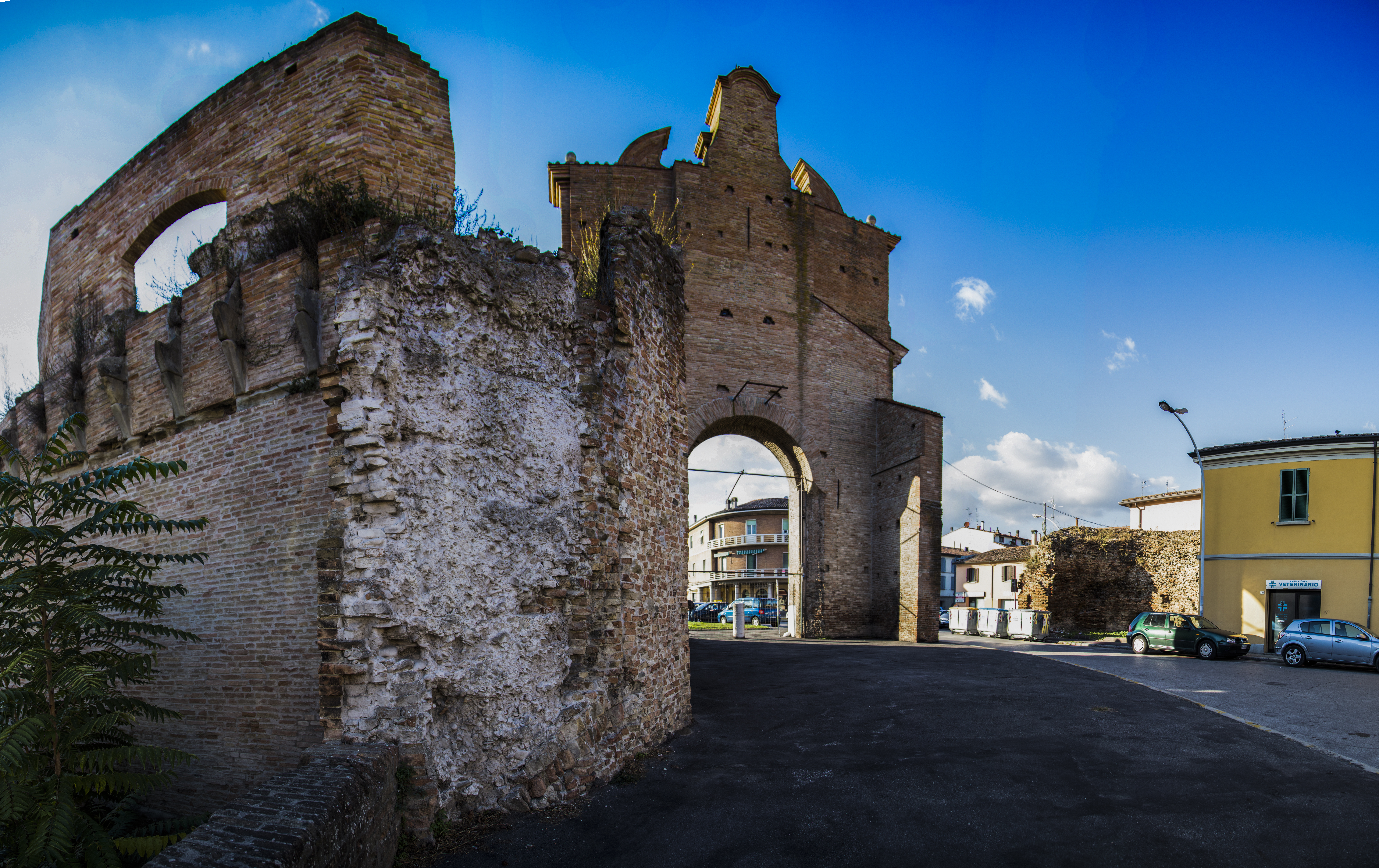 Porta Schiavonia si trova all'ingresso Nord della città. E' l'unica sopravvissuta alla ristrutturazione urbanistica ottocentesca. Sul curioso nome della Porta si sono formulate varie ipotesi. La più probabile suggerisce che l’area su cui sorge la Porta fosse abitata dai Forlivesi, fatti schiavi da Alarico nel 400 e liberati per l’intervento di San Mercuriale. This is a photo of a monument which is part of cultural heritage of Italy.